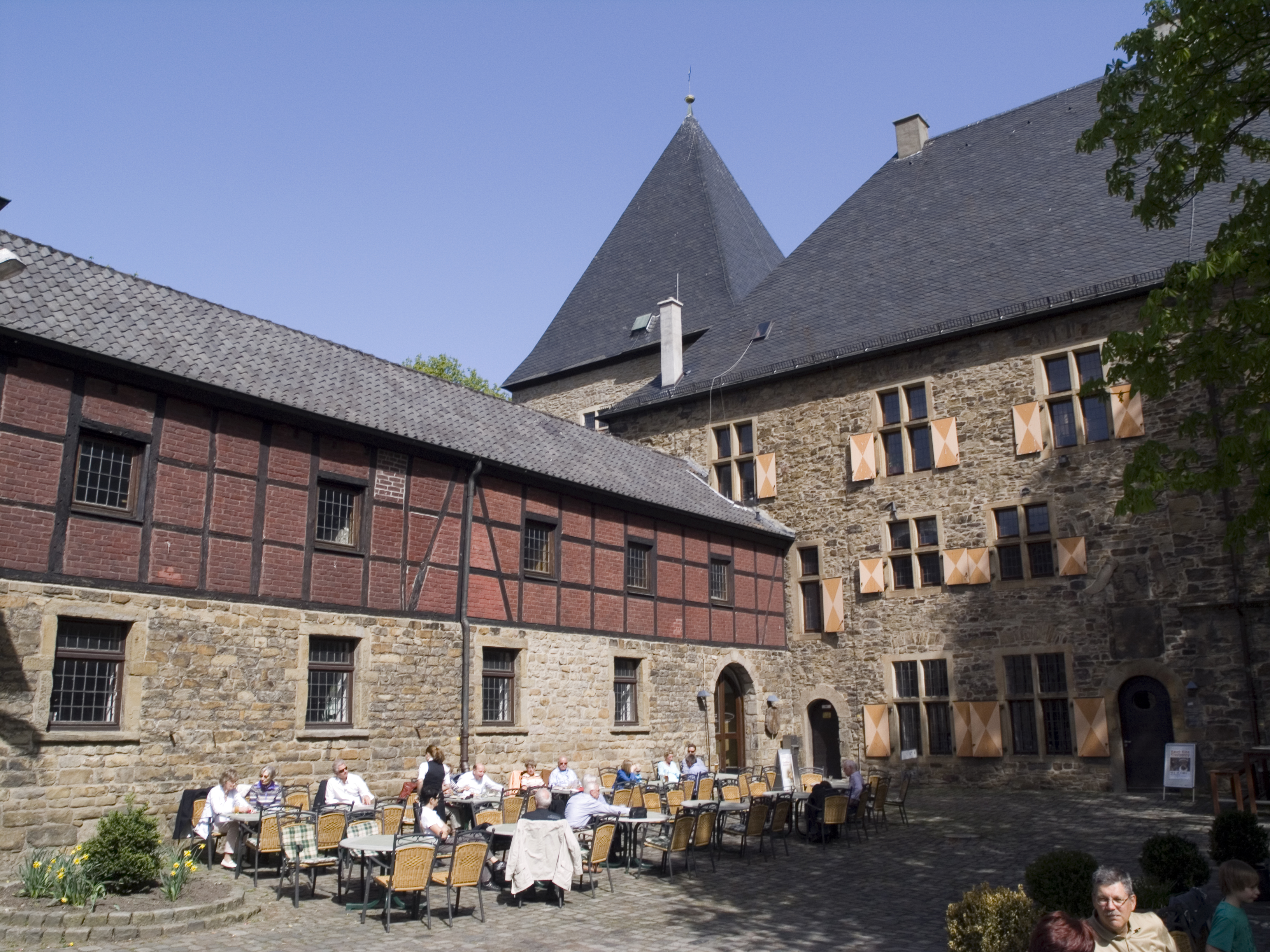 Северный Рейн - Вестфалия, Хаттинген. Замок Кемнаде